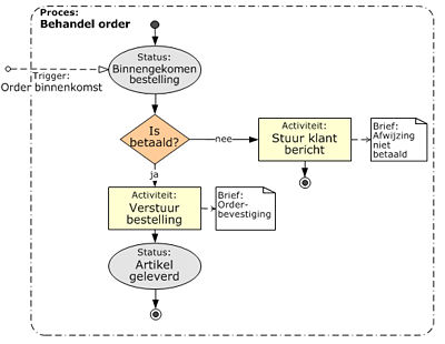 Voorbeeld van een eenvoudig BPM schema (Business Process Modeling) Gemaakt als voorbeeld over het topic Business_Process_Modeling.